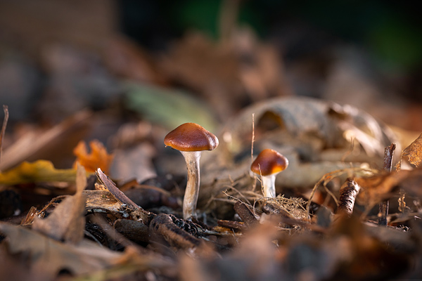 Psilocybe cyanescens es un hongo psilocibio. Contiene psilocibina, una sustancia utilizada en las investigaciones clínicas con psicodélicos. Fotografía por Thomas Angus, Imperial College London.